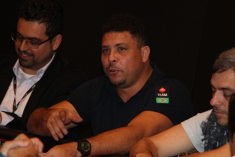 Ronaldo Fenômeno-010